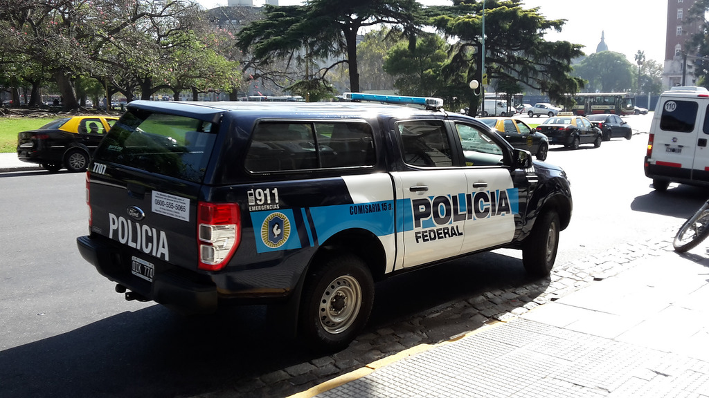 Camioneta de la Policía Federal Argentina (PFA) frente a la Plaza San Martín de la ciudad de Buenos Aires